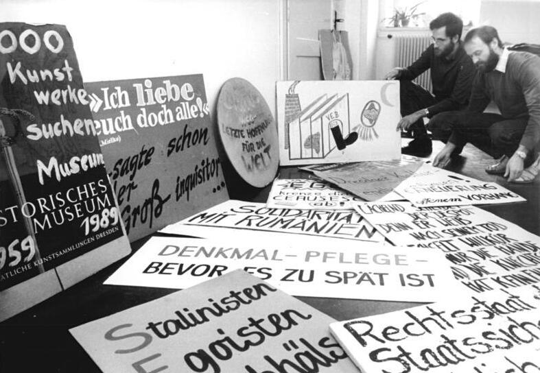 Dresden, Transparente im Museum für Stadtgeschichte ADN-ZB Hiekel 25.11.89 Dresden: Im Museum für Stadtgeschichte werden zur Zeit über 100 Transparente gesichtet, die Dresdener Bürger am 19.11.89 während der Demonstration der Kunst- und Kulturschaffenden gezeigt hatten. Ausgewählte Schrifttafeln sollen zu einem späteren Zeitpunkt in die ständige Ausstellung eingegliedert werden.